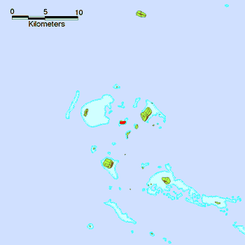 Lea faka-Tonga: no original description